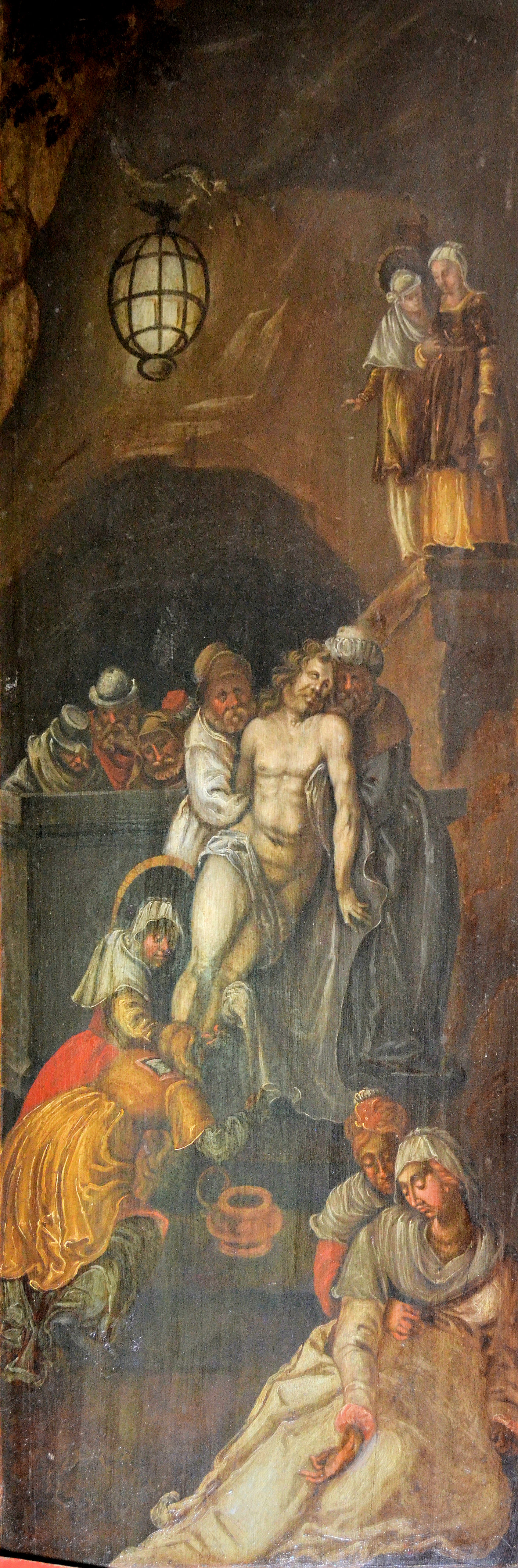 Marianowo - zespół klasztorny cystersów